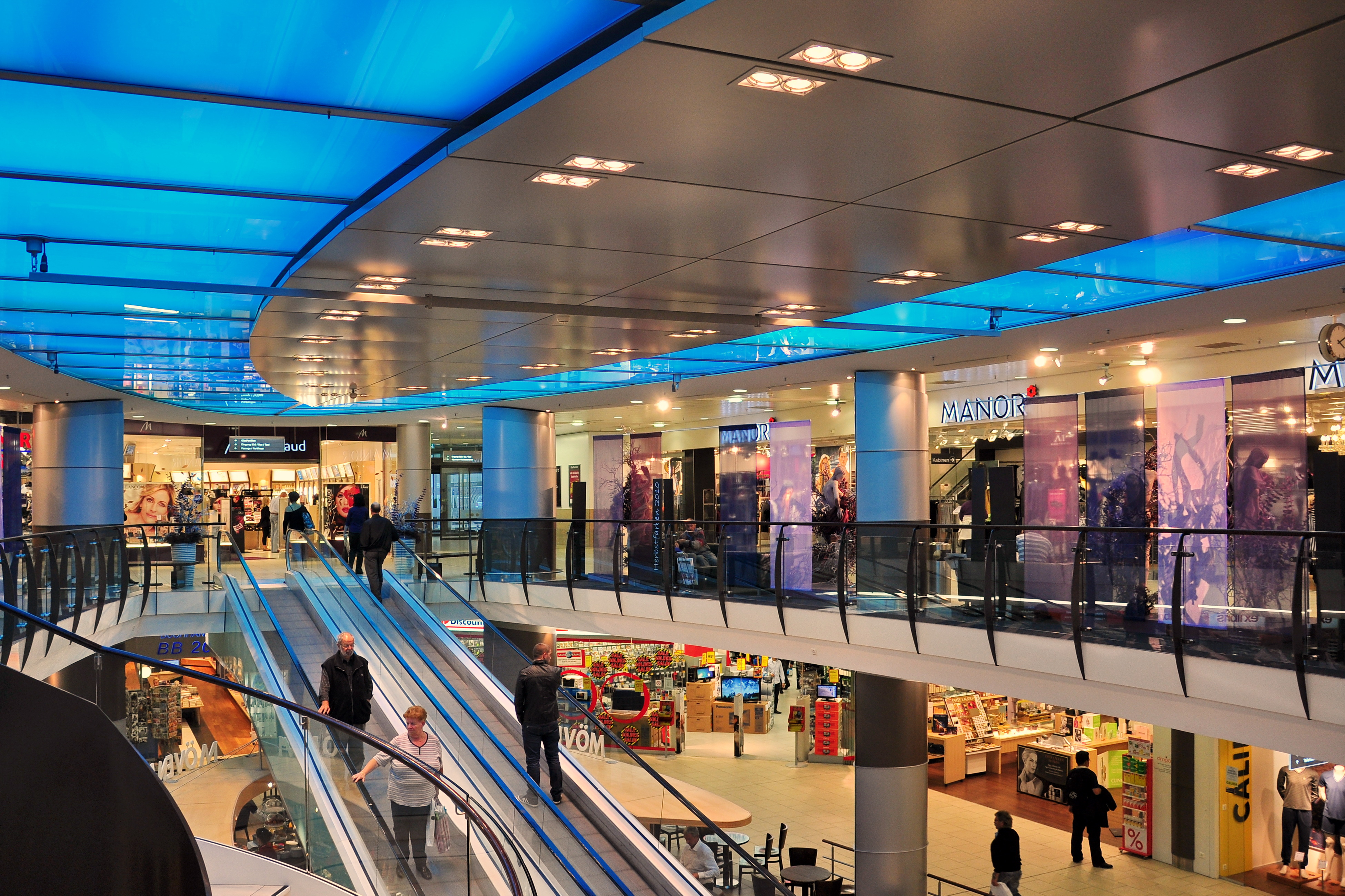 Seedamm-Center in Pfäffikon SZ (Switzerland)